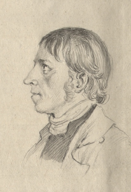 Johann Ulrich Schellenberg (1773–1838): Der bayerische Schriftsteller und Pestalozzianer Andreas Moser (1766–1806). Universitätsbibliothek Basel Rb 591.